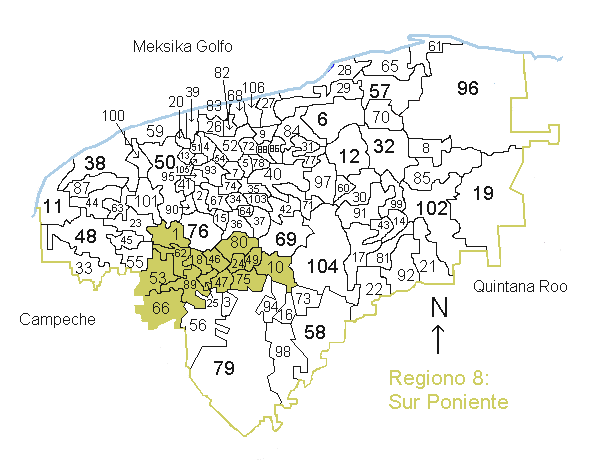 La bildo montras la situon de la regiono 8, Sur Poniente" en Yucatán Kategorio:Geografio de Yucatán